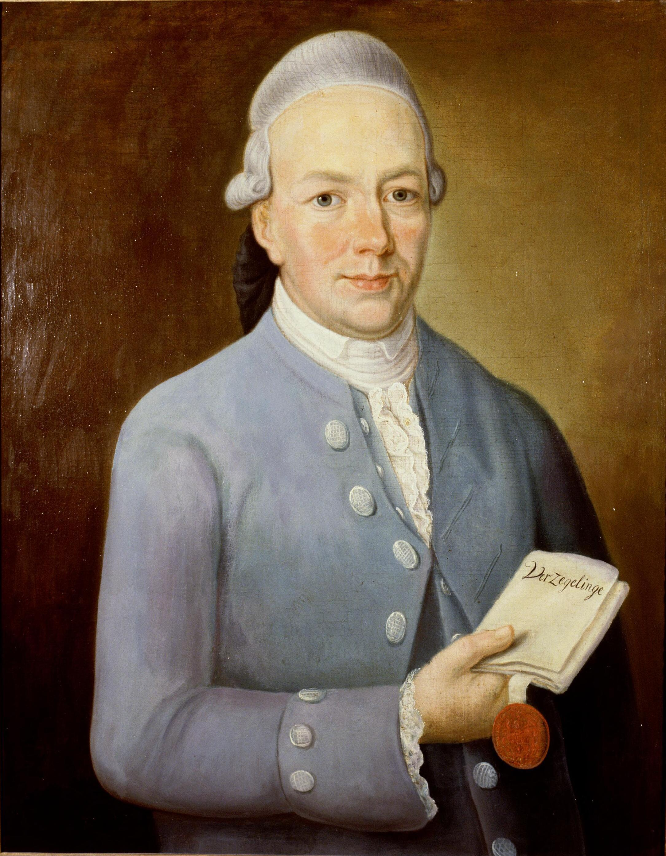 Georg Rudolph Wolter Kymmell (1745-1814)